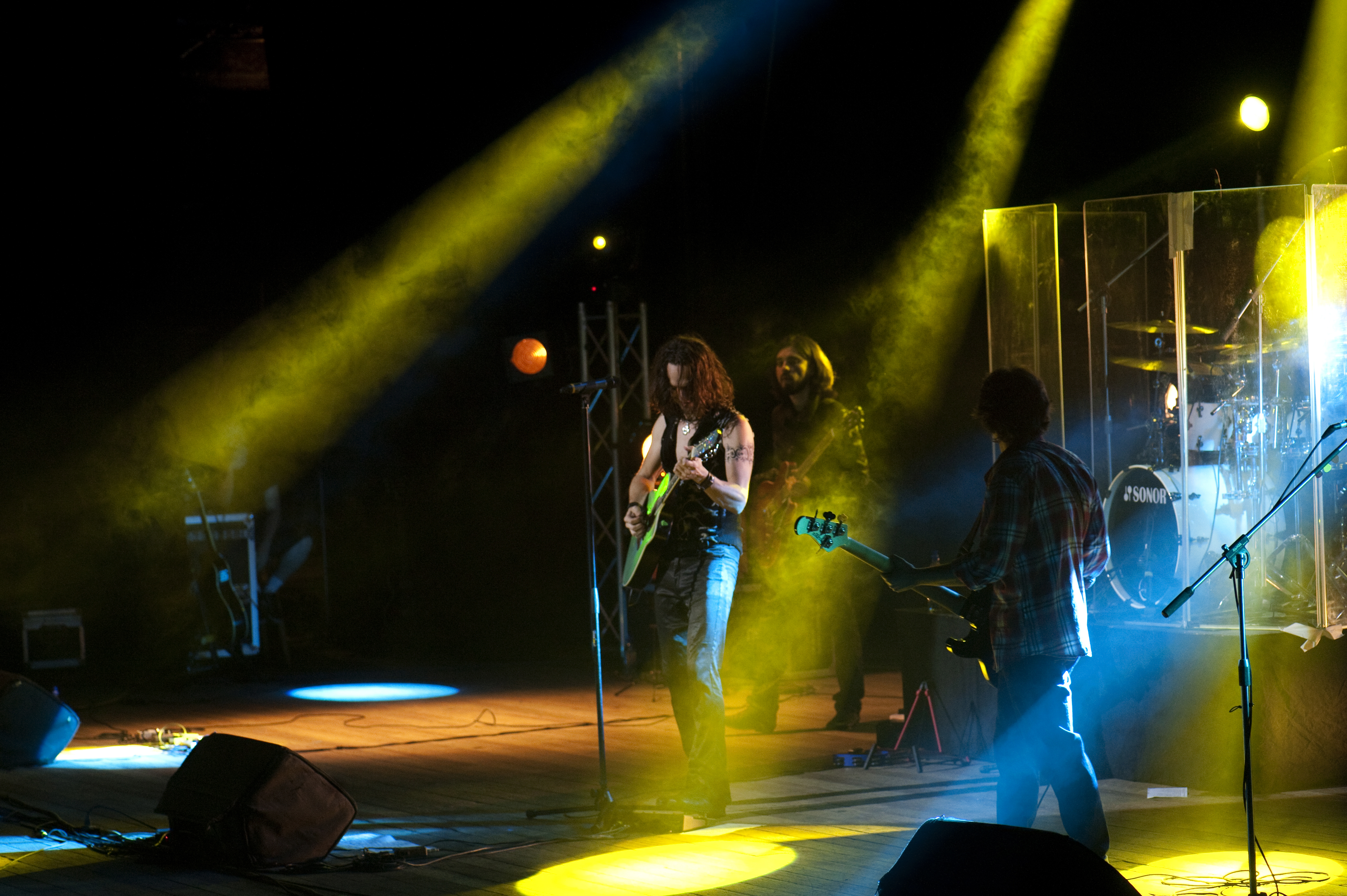 Concierto 20 aniversario de El Parque